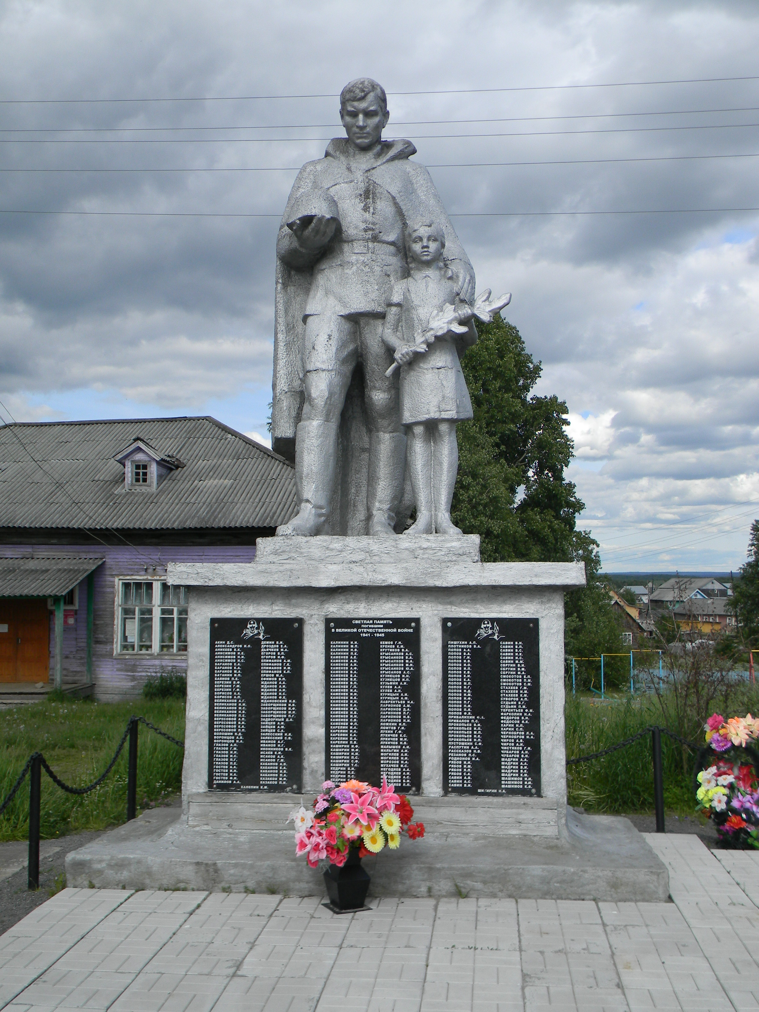 Обелиск павшим в годы Великой Отечественной войны 1941-1945 годов: Порог, Онежский район, Архангельская область